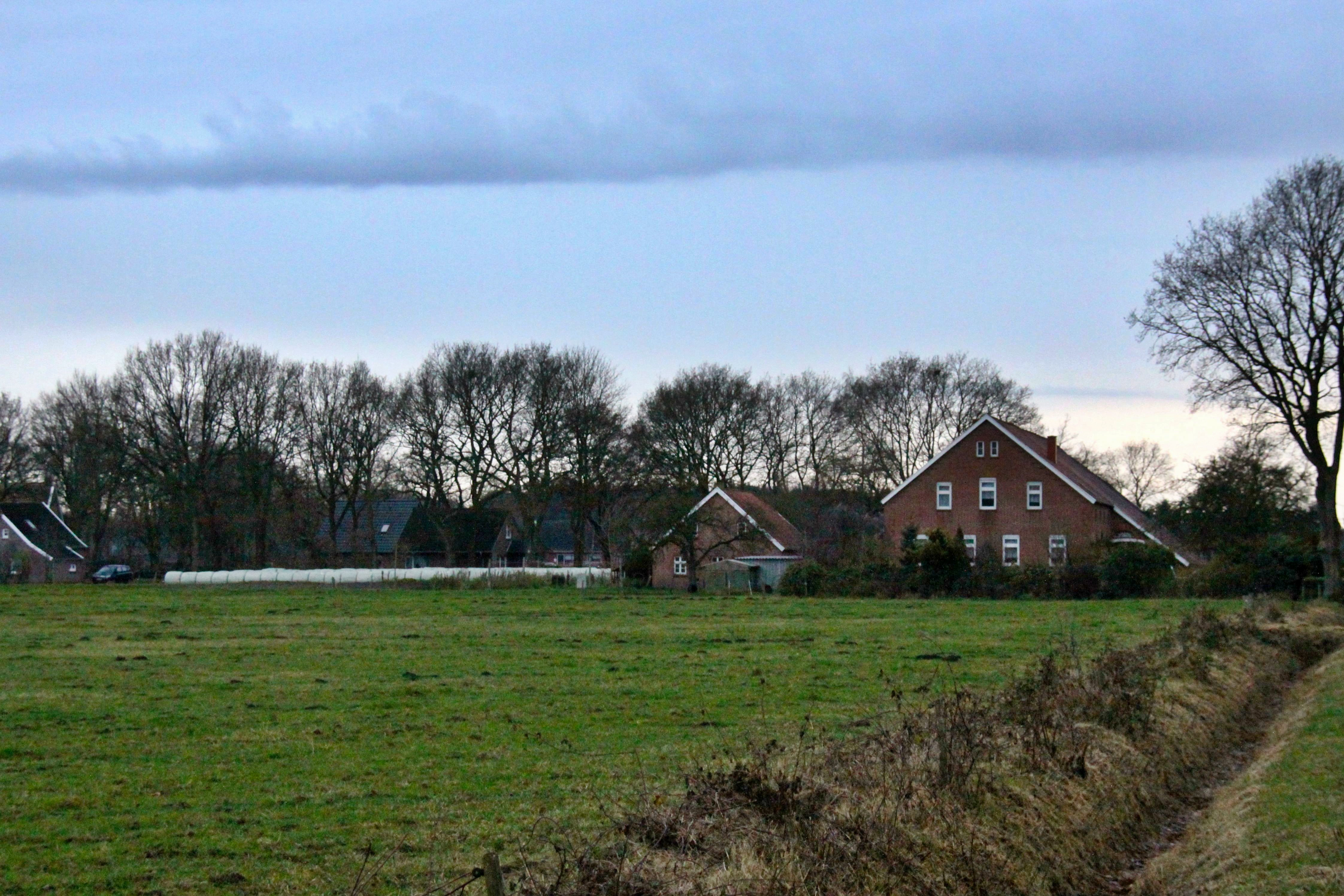 Landwirtschaftliche in Hasselt.